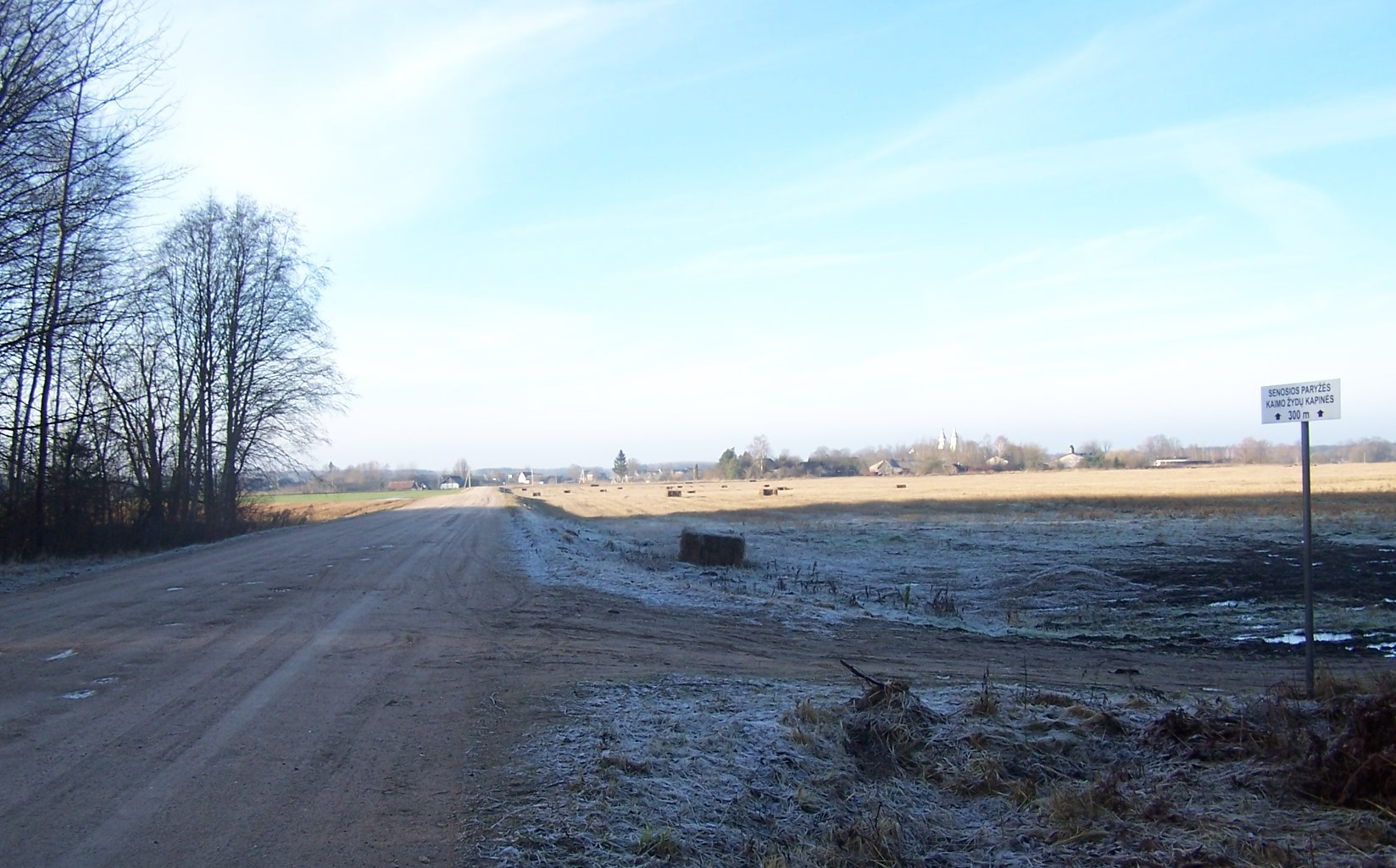 Subačiaus žydų senosios kapinės